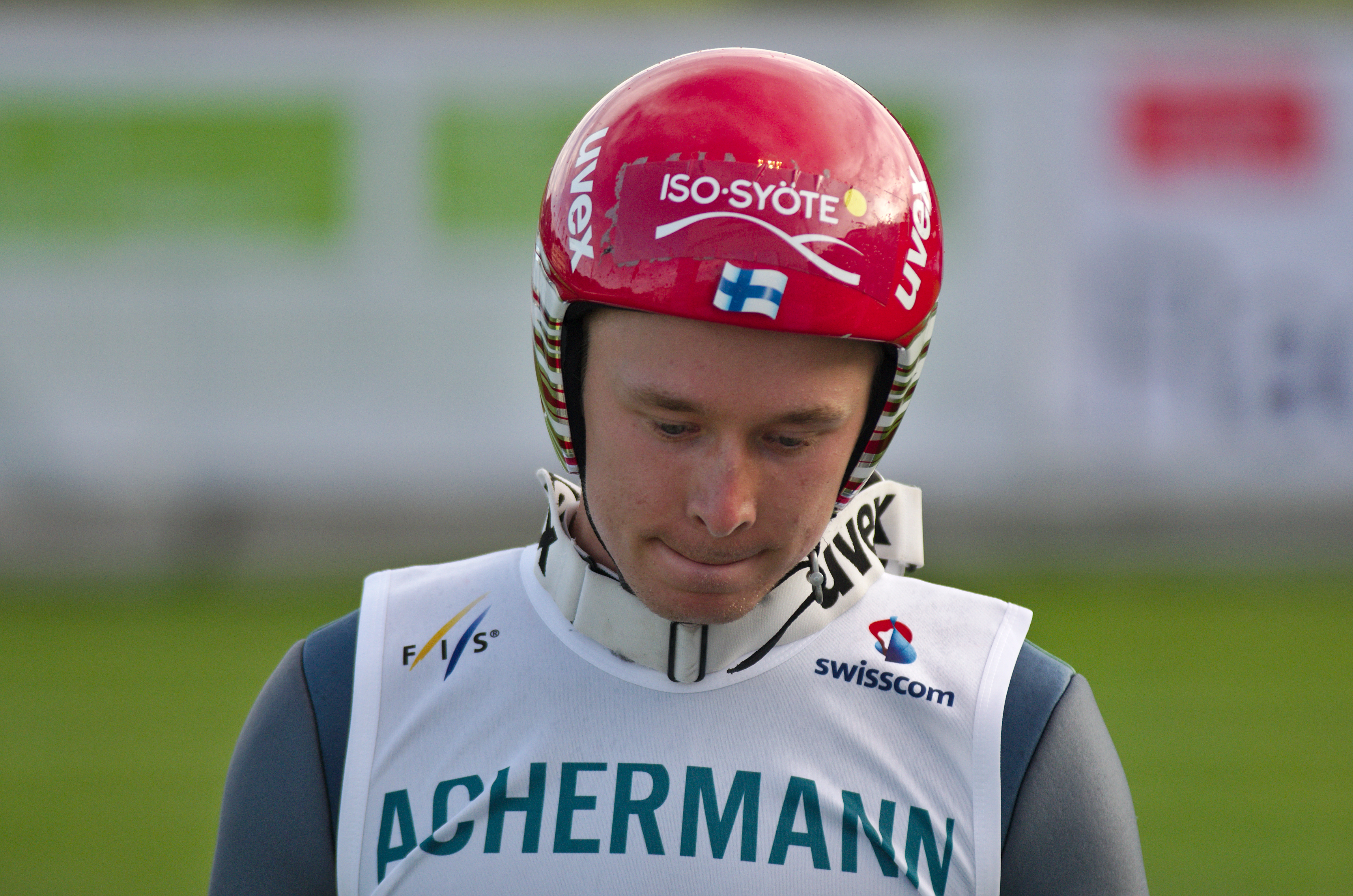 FIS Sommer Grand Prix 2014 - 20140809 - Jarkko Maeaettae